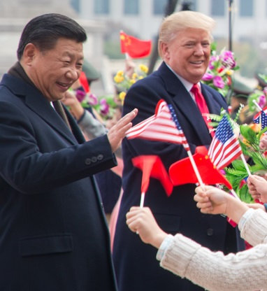 Donald Trump ao lado de Xi Jinping em novembro de 2017.